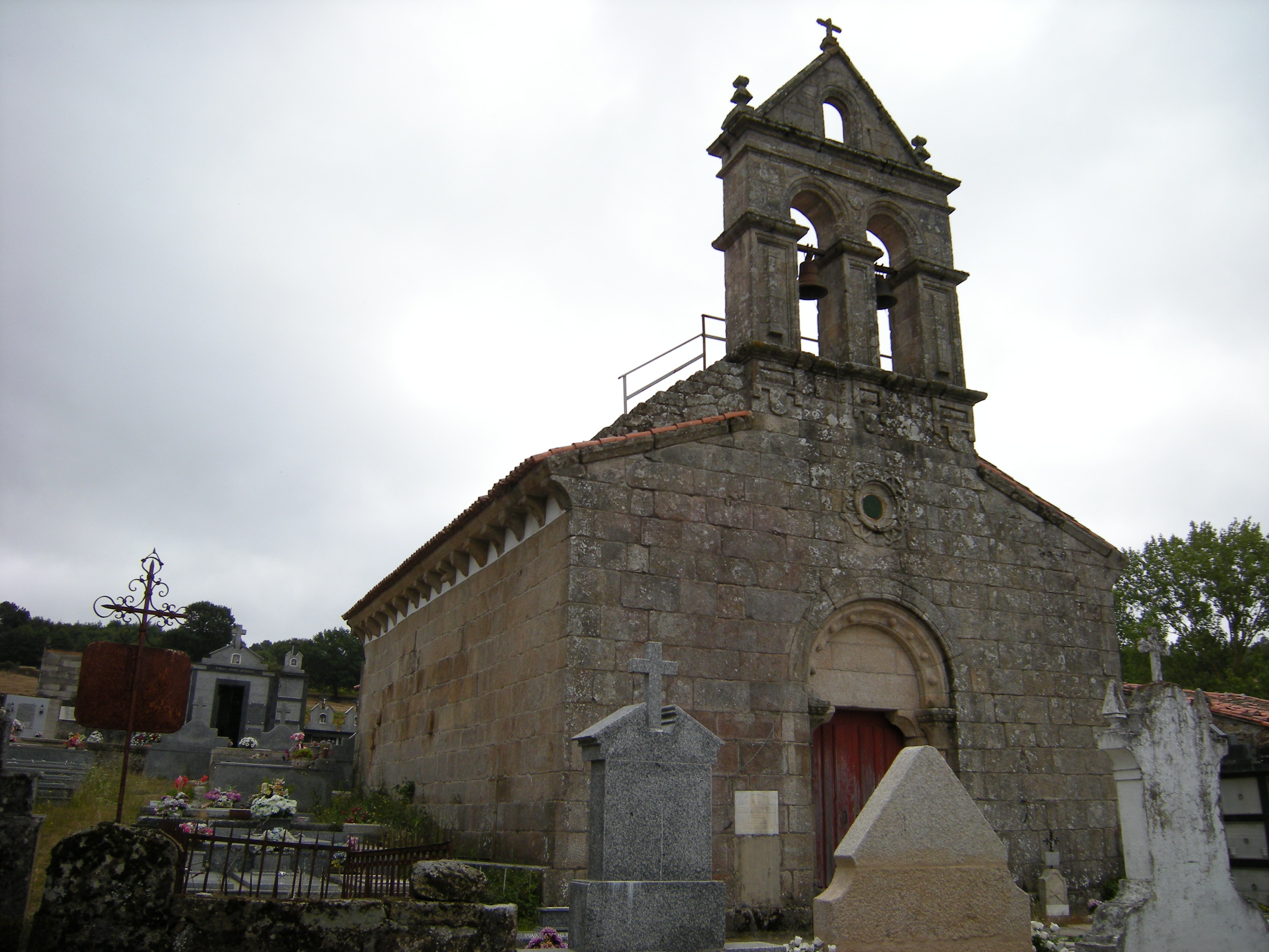 Edificada en el siglo XII, es de planta de nave única y ábside rectangular.